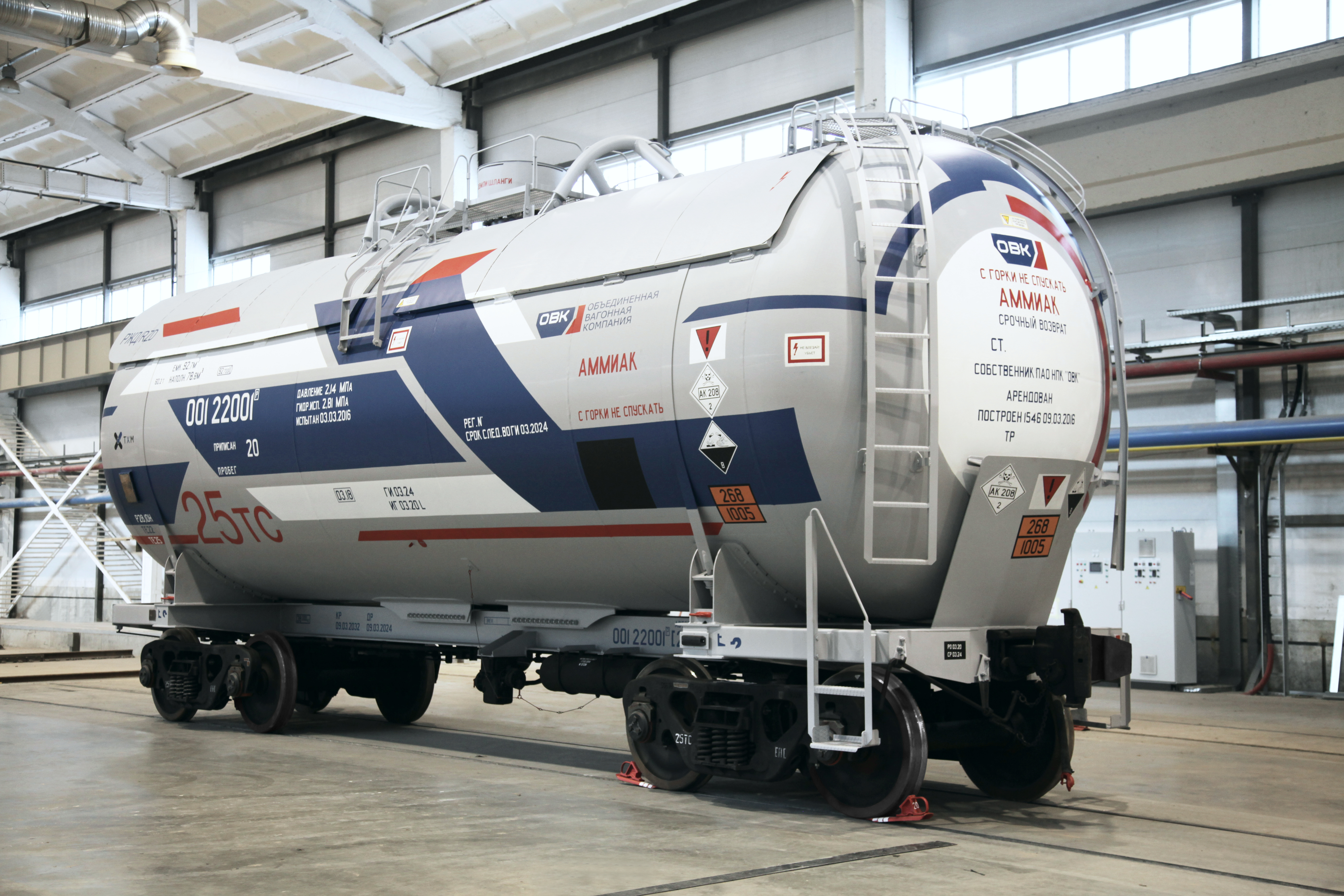 Вагон-цистерна производства ТихвинХимМаш